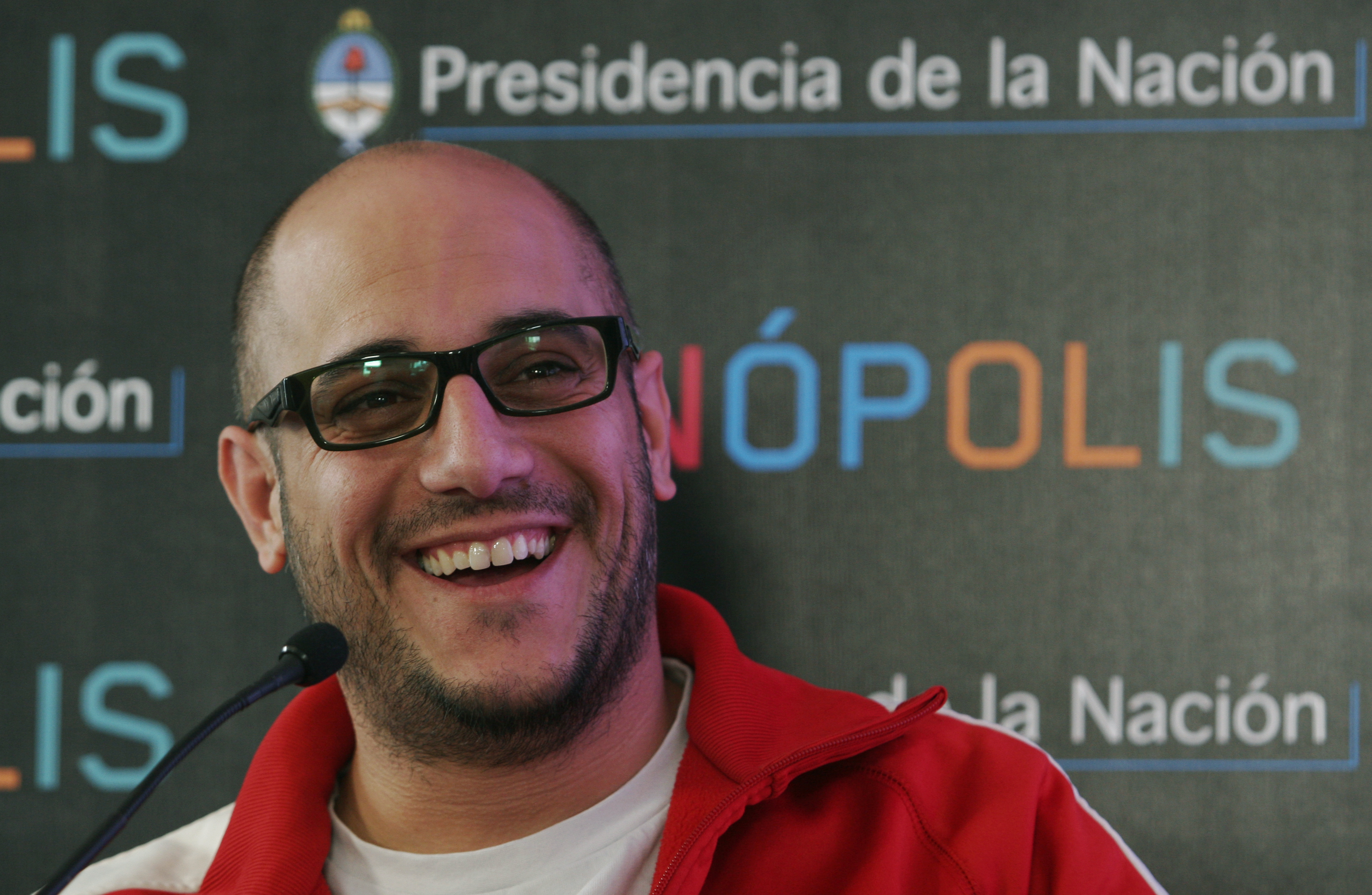 07 de Agosto de 2011. Charla "Ciencia y arte como ingredientes de la cocina molecular", moderada por Fierita Catalano. Dante Liporace, cocinero e invitado de la charla, hizo una demostración del uso del Nitrógeno líquido en la cocina y preparó con su ayudante unos "pochoclos" helados de chocolate blanco. Fotos: Laura Szenkierman/Tecnópolis.